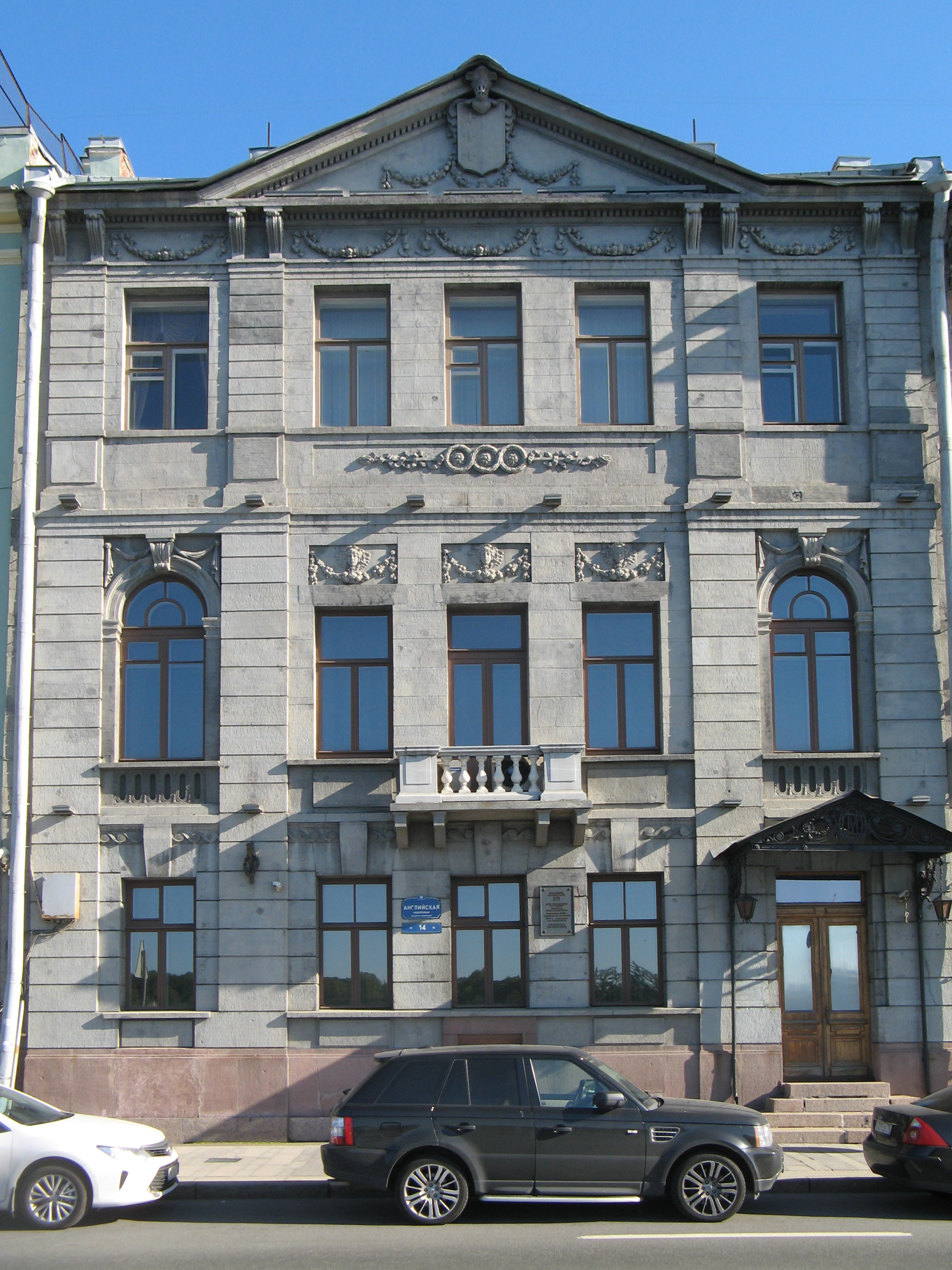 Домовладение Тенишевых (Чаплиц М.К.): Английская набережная, 14, Галерная улица, 13, Адмиралтейский район, Санкт-Петербург